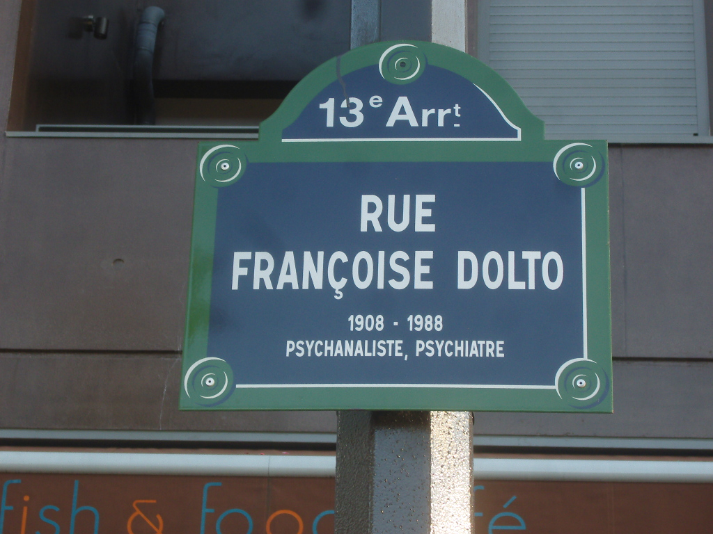 Paris 13e arrondissement - Rue Françoise-Dolto - plaque de rue